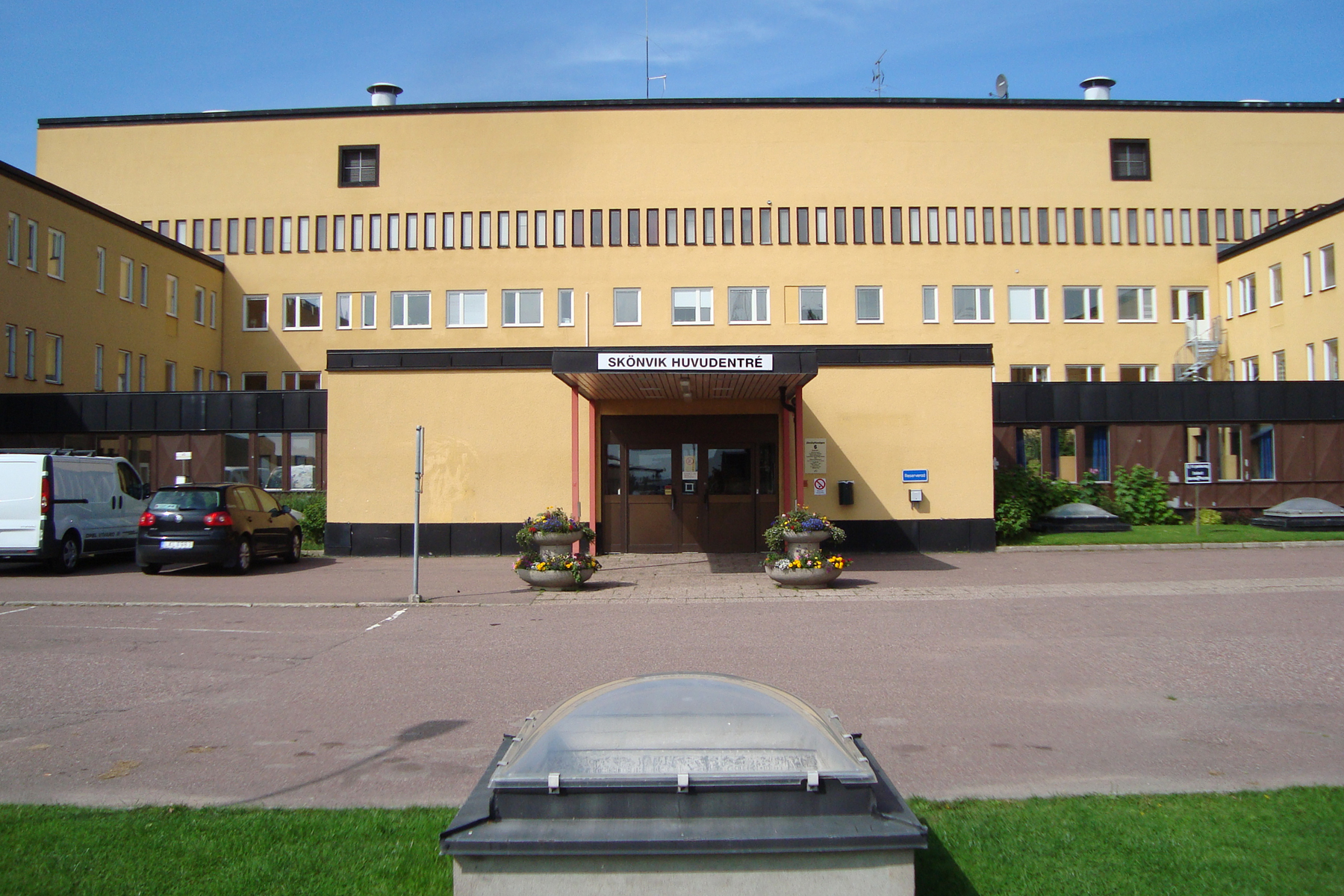 Old mental hospital ("Säters mentalsjukhus") area Skönvik, Säter, Sweden